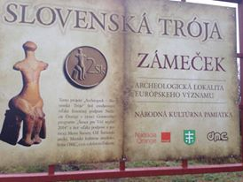 Informačná tabula